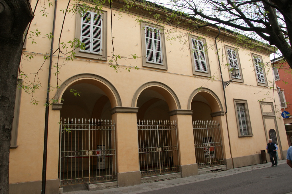 Ingresso del Teatro Verdi